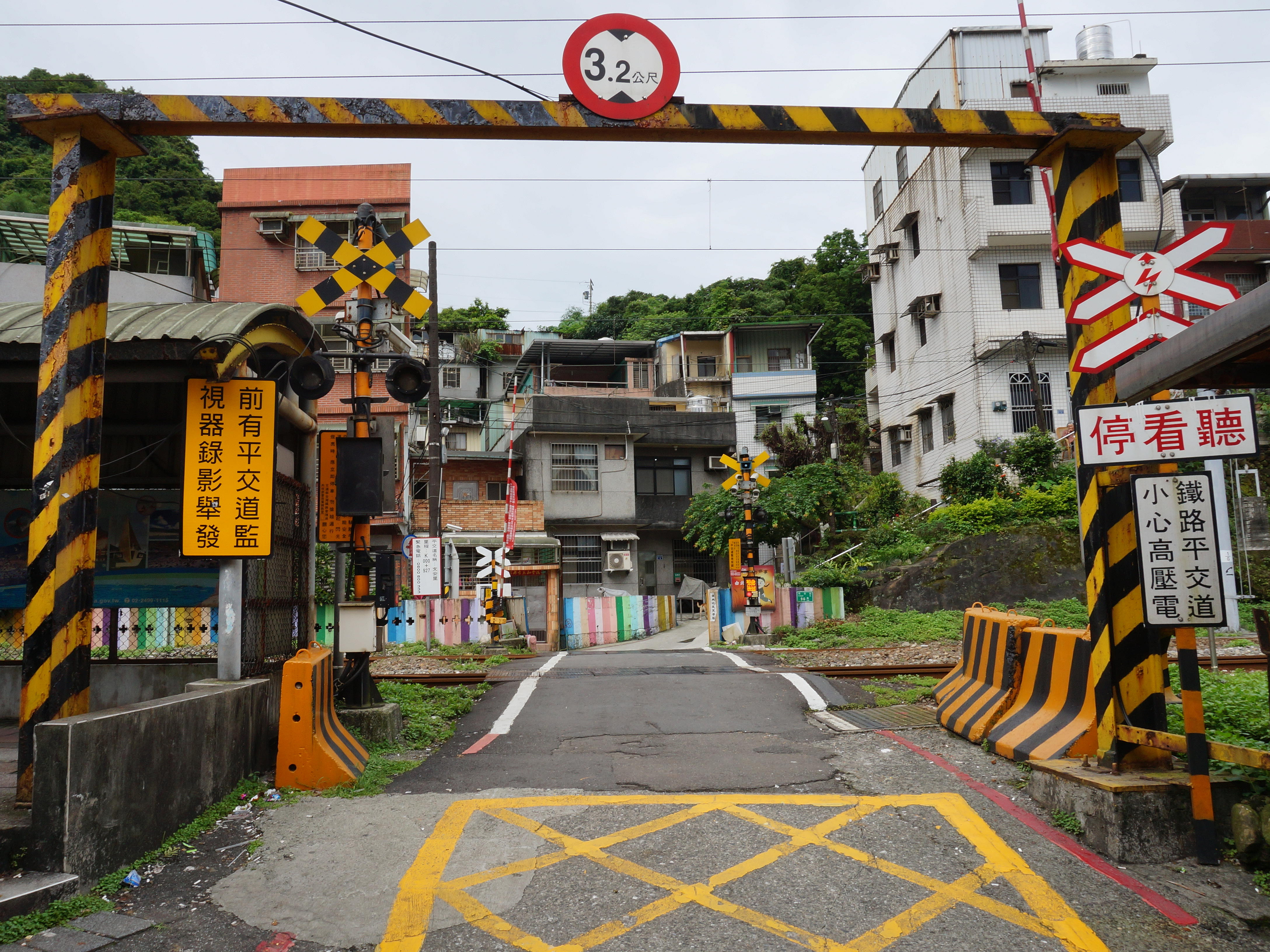 文安里平交道，位於基隆市仁愛區文安里龍安街96巷。